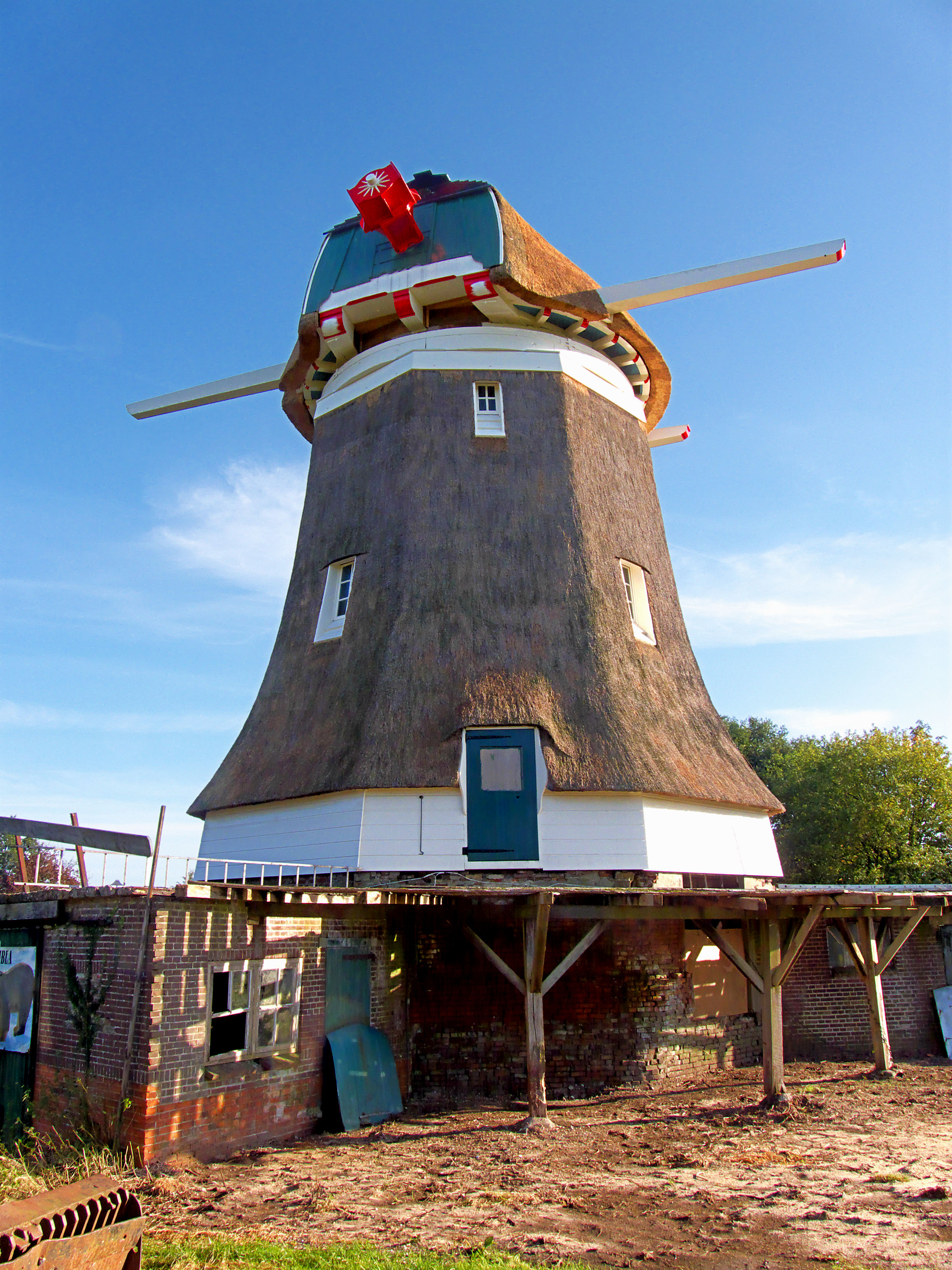 Molen De Hoop, Elspeet